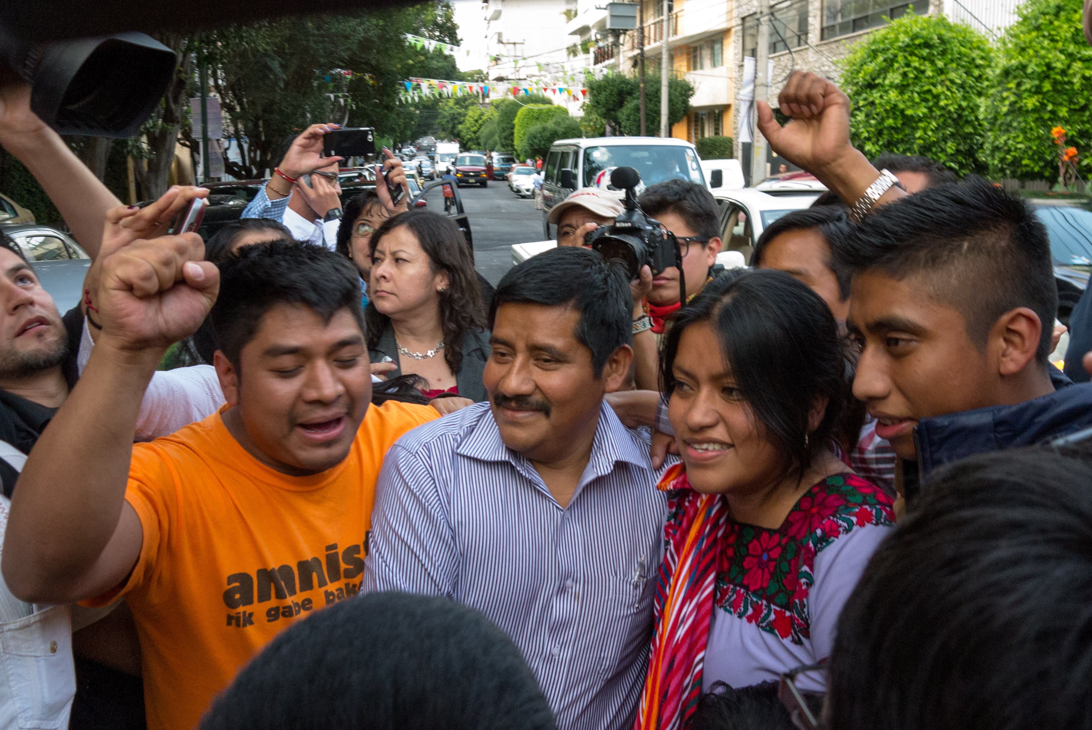 “¿Quién es Alberto Patishtan? Soy yo, una persona que escucha y que está perdiendo la vista por la enfermedad, pero ahora ve más claro en su corazón”. Así comenzó a hablar Alberto Patishtan frente a la gente reunida en un acto para celebrar su liberación. El profesor chiapaneco aseguró que siempre ha sido inocente “ante los ojos de Dios y de mí mismo; quisieron acabar con mi lucha, quisieron restar pero lo que lograron fue multiplicar, quisieron apagar pero lo que hicieron fue hacer resplandecer”. Así, Patishtan afirma que durante todo el tiempo que estuvo en la cárcel siempre fue libre. Él fue encarcelado por oponerse al gobierno municipal, “sólo soy uno que vió lo que estaba pasando en su pueblo, me encontré con que se daba otro tipo de esclavitud. Así que dije ‘¡No más, voy a defender a mi pueblo!’ Y salí a gritar, a levantar la mano. Por eso me encarcelaron”. Información completa en